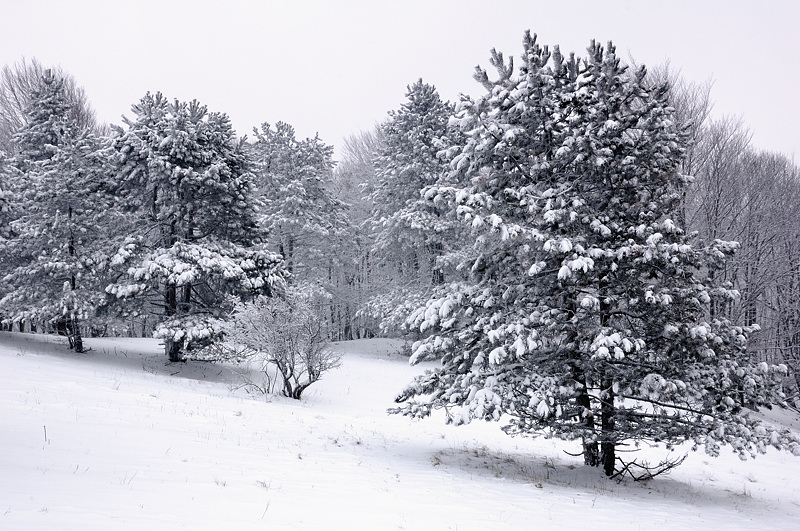 Зима в Уссурийском заповеднике